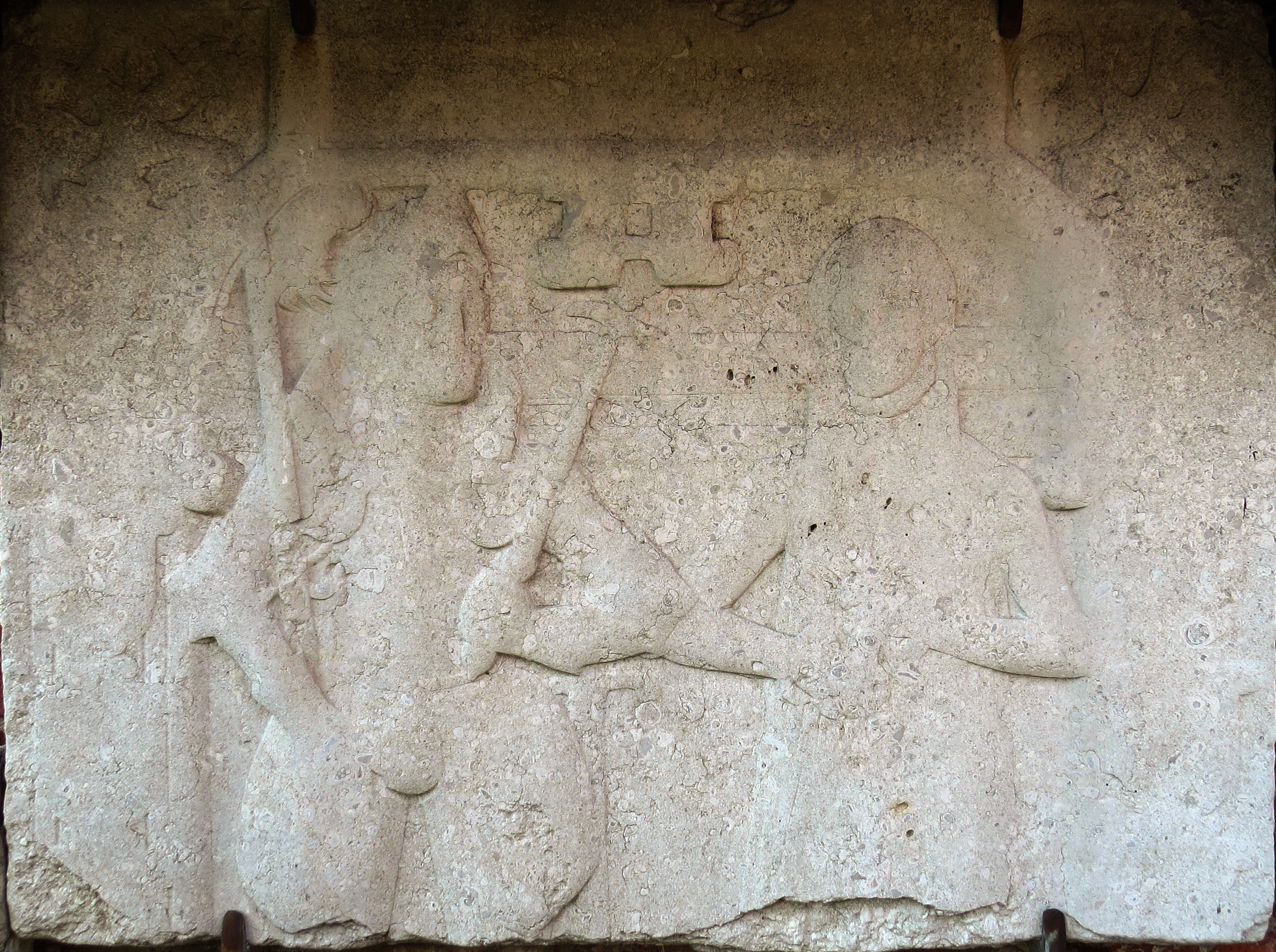 Gravsten over Knud Gyldenstierne og Sidsel Ulfstand ved Vor Frue Kirke i Kalundborg